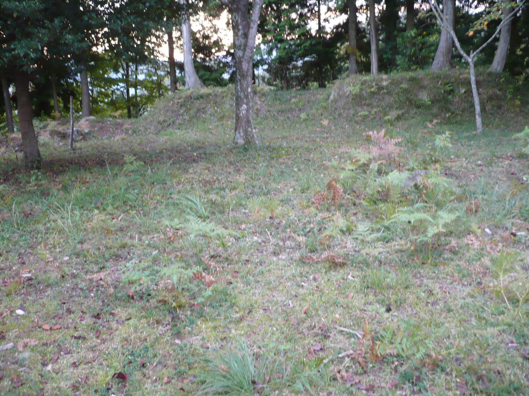 本丸跡と土塁